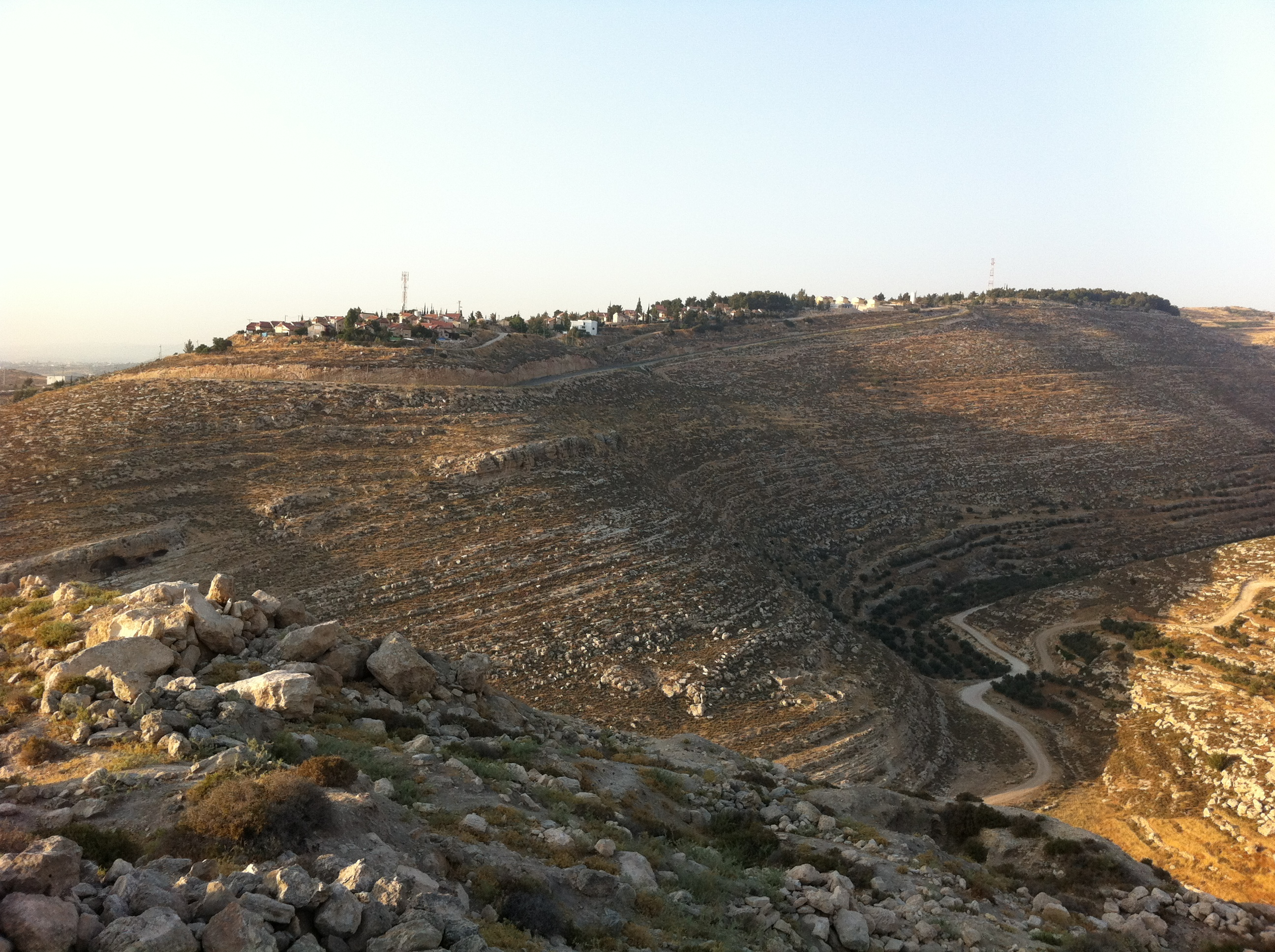 נוף מאדורה - ים וארובות אשקלון